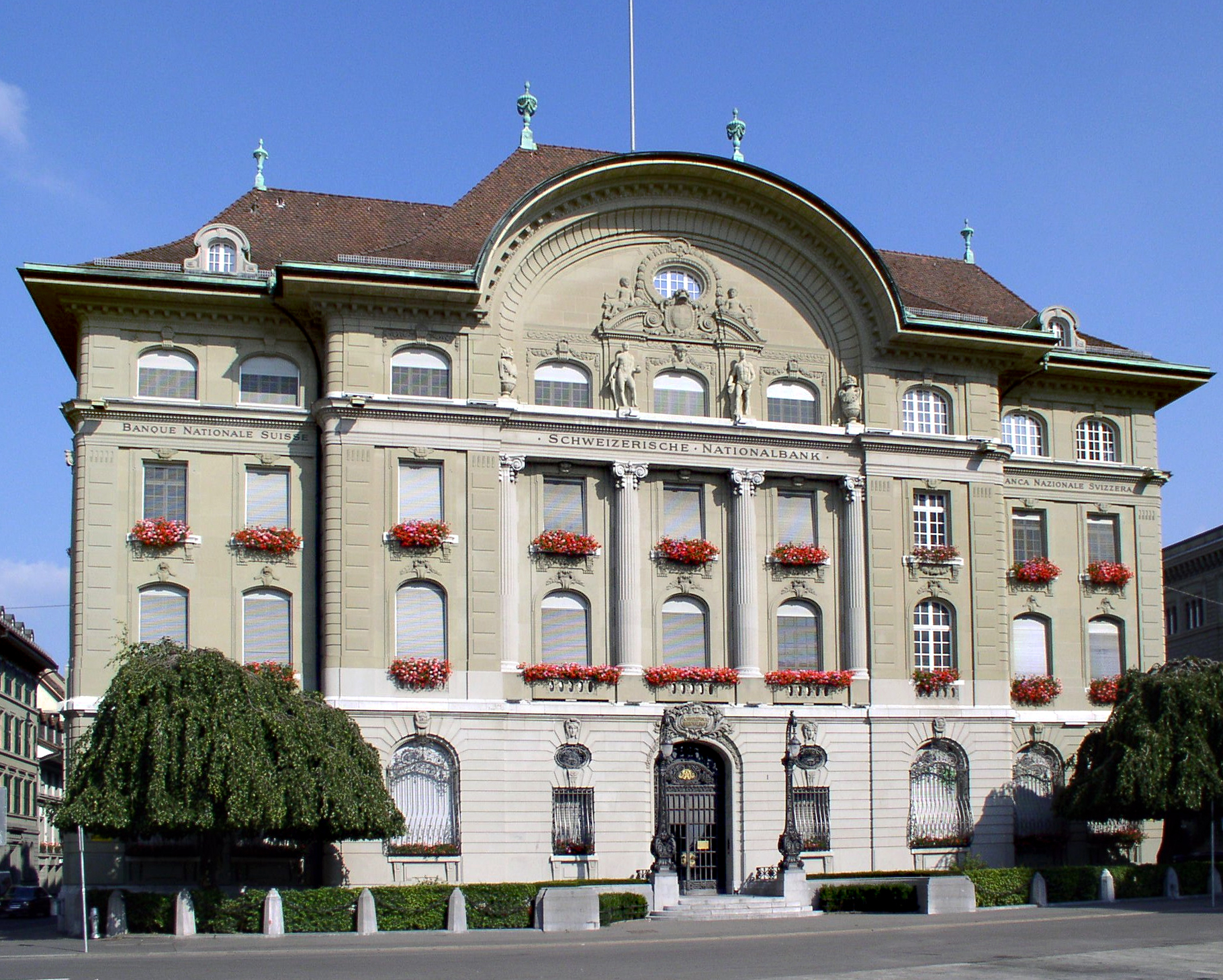 Gebäude der Schweizerischen Nationalbank in Bern, Hauptfront am Bundesplatz